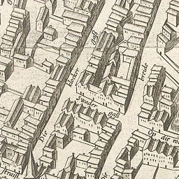 Kupferstich: Arnold Mercator - Breide straiß und klocker gaß (1570)